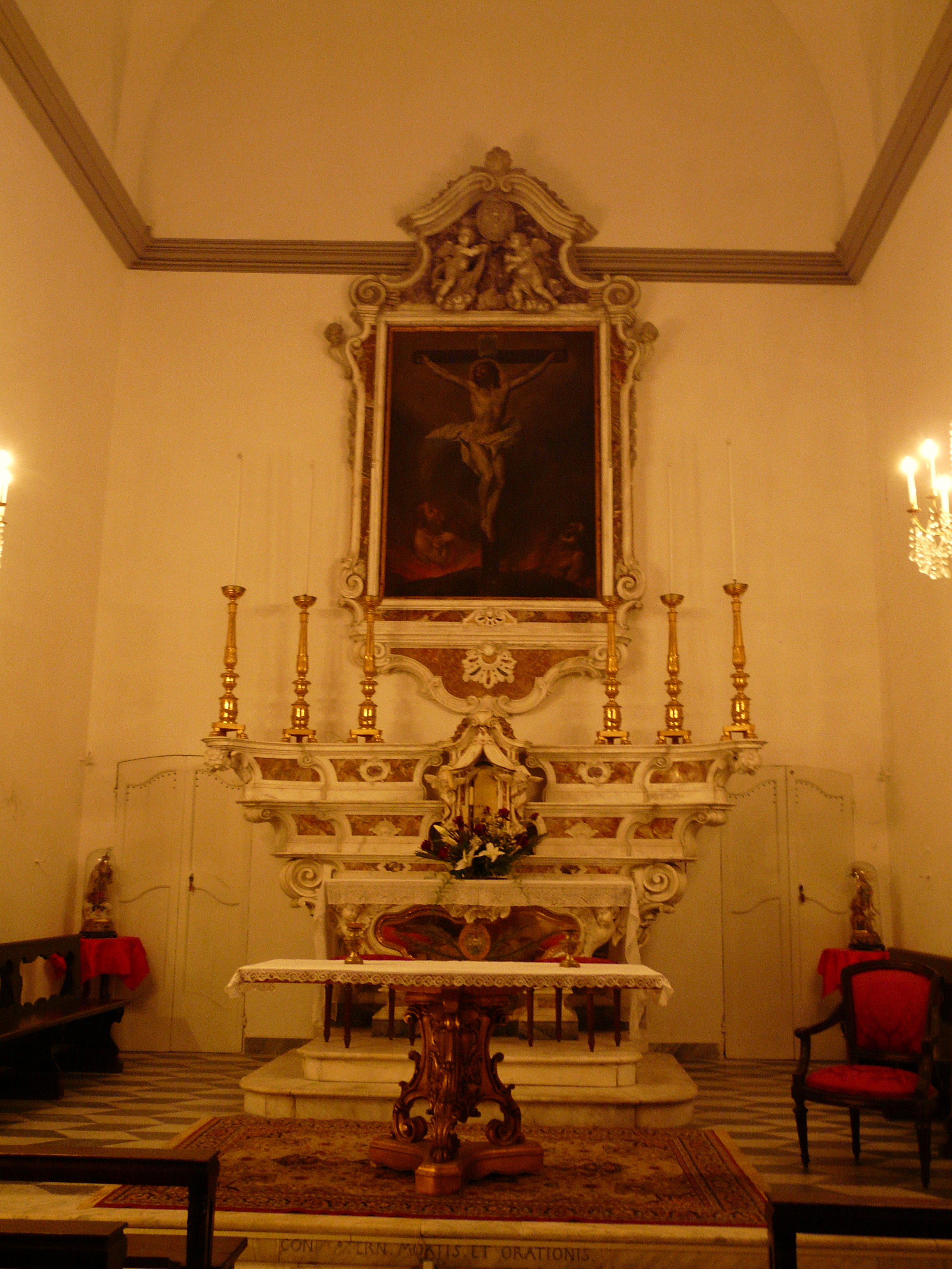 Altare maggiore della pieve di Santo Stefano, Rapallo, Liguria, Italia